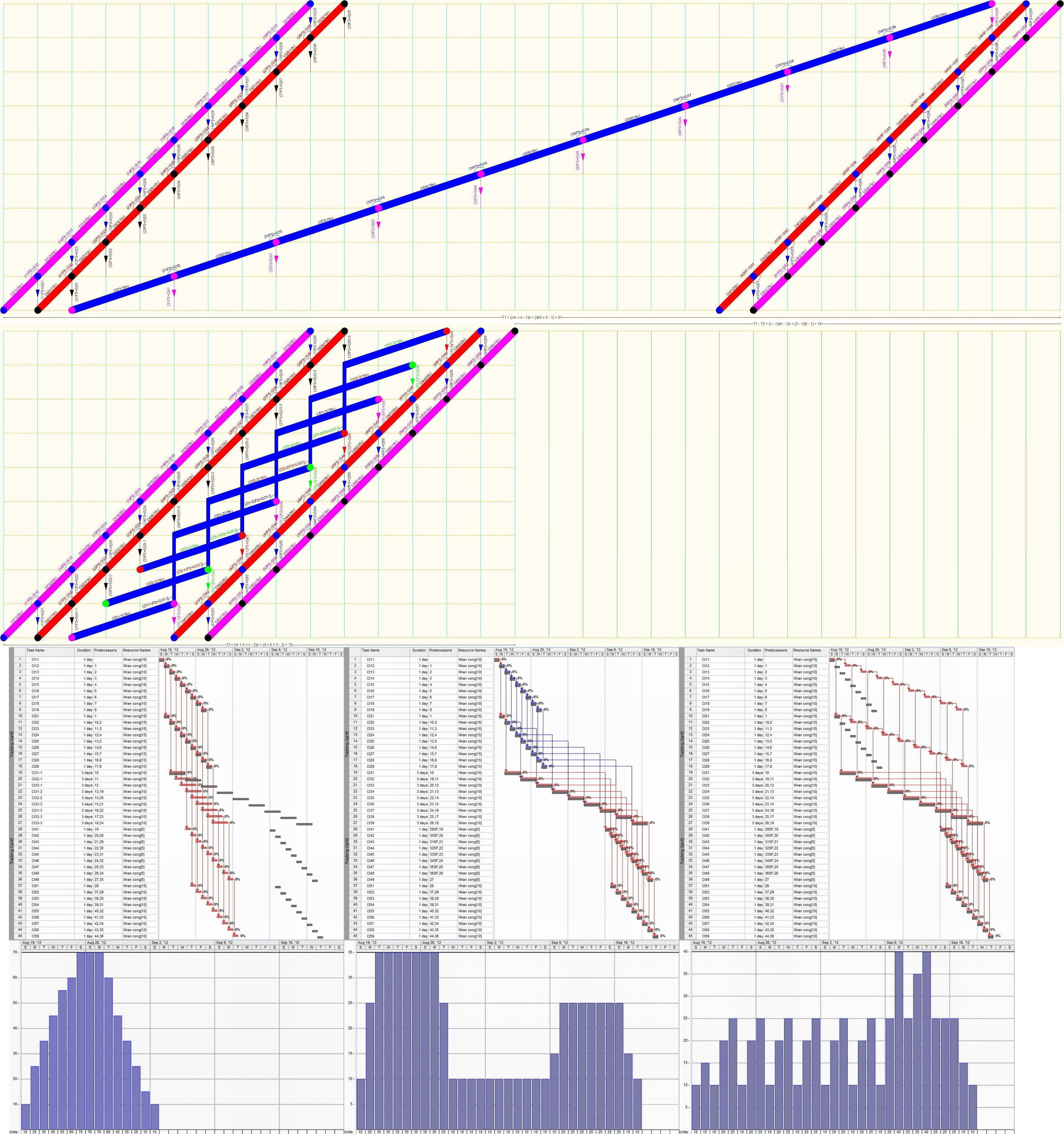 Hình vẽ mô tả việc biến đổi dây chuyền đơn nhịp bội số (còn gọi là cân bằng dây chuyền nhịp bội theo nhịp nhanh), trong tiến độ dây chuyền nhịp bội (nhịp nhanh), thành nhiều dây chuyền đơn cùng chuyên môn. Nhằm làm giảm tối đa thời lượng thực hiện toàn bộ dự án. Hình hoàn toàn do tôi sáng tạo ra, qua việc vẽ trên AutoCAD 2010, chụp ảnh màn hình, và sửa đổi trên ACD FotoCanvas 3.0 cùng Paint.